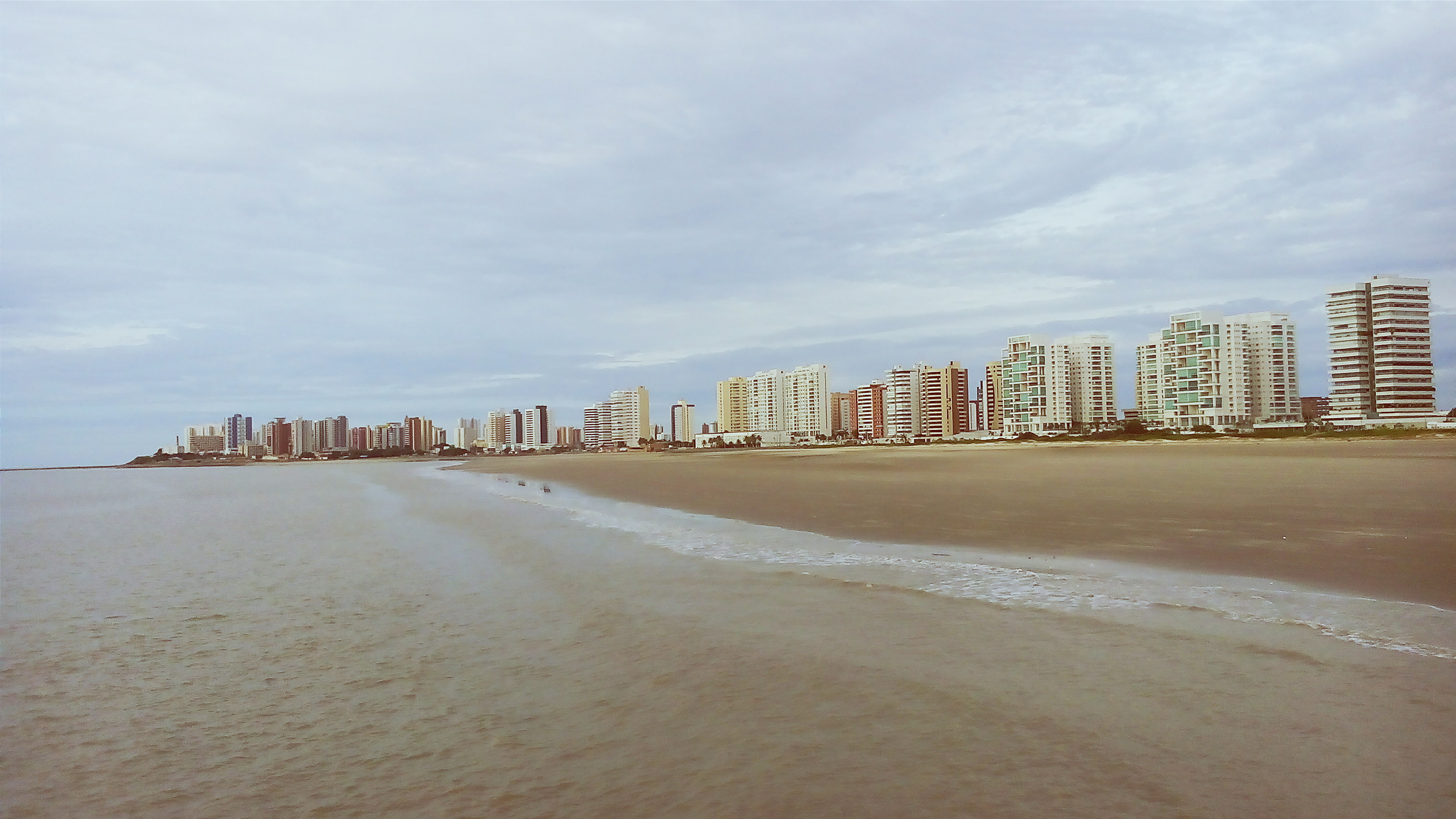 Vista ampla da praia Ponta D'Areia em São Luís do Maranhão.